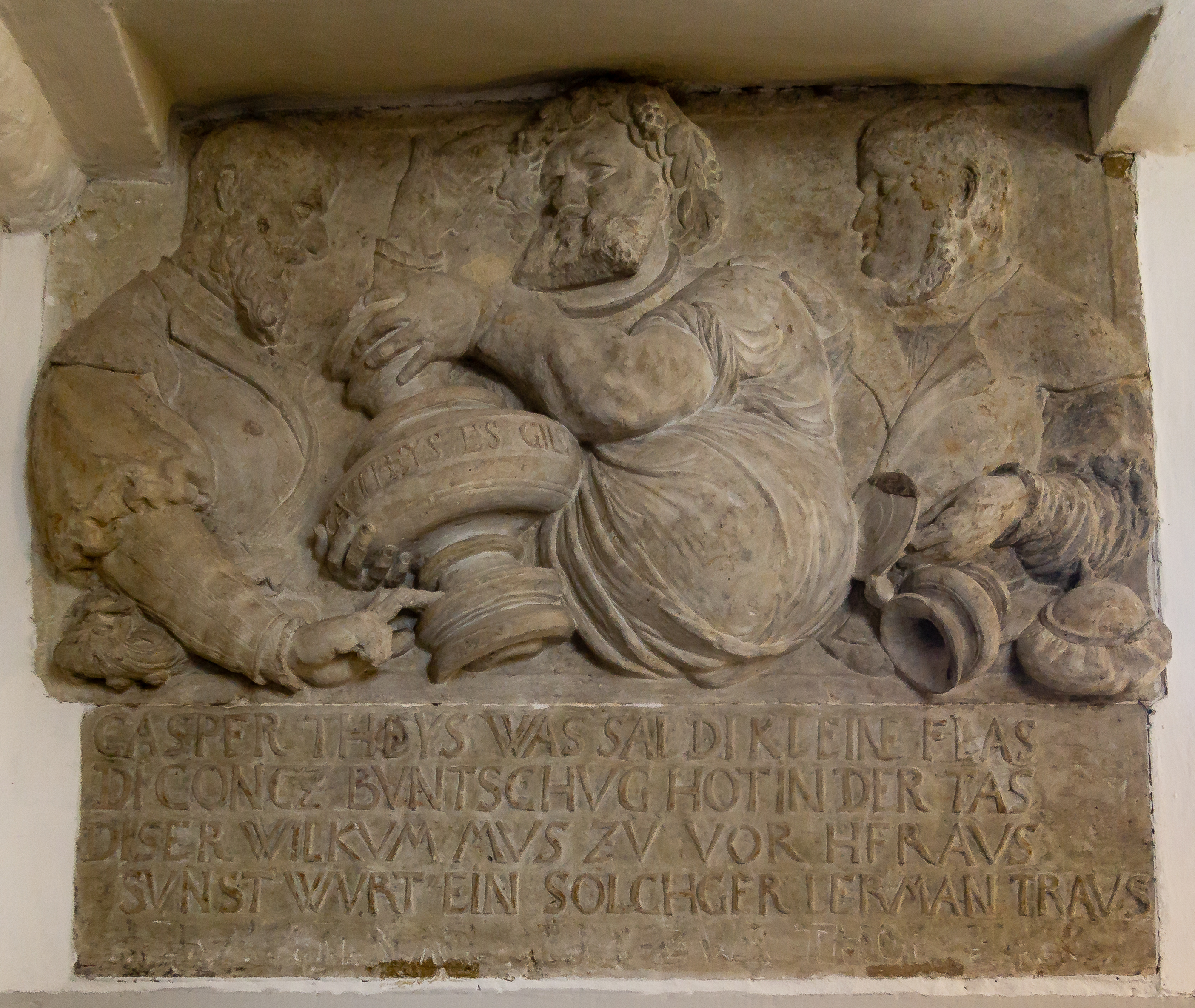 Zeugnis Berliner Renaissance Kultur; unklar ist die Identität der beiden linken Figuren. Helmut Börsch-Supan schlug für den mit Weinlaub und Trauben gekröntem Mann ein auf den Namen anspielendes Selbstporträt Hans Schencks vor, das keine Ähnlichkeit mit dem Porträt am Epitaph Erzbischofs Friedrichs von Brandenburg (1530–1552) hat.